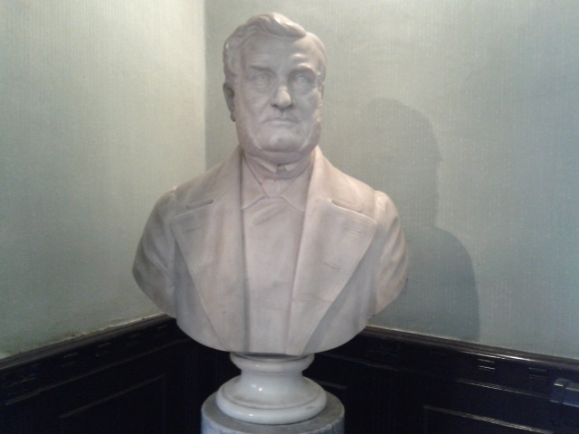 Busto marmoreo di Alessandro Torlonia